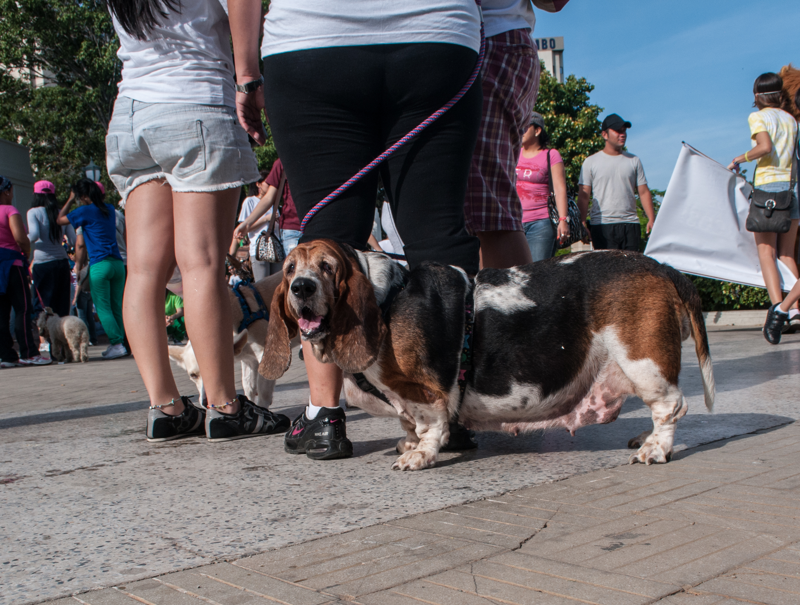 Caminata anual en favor de los animales celebrada en Maracaibo anualmente, en este caso el 3 de Noviembre de 2012